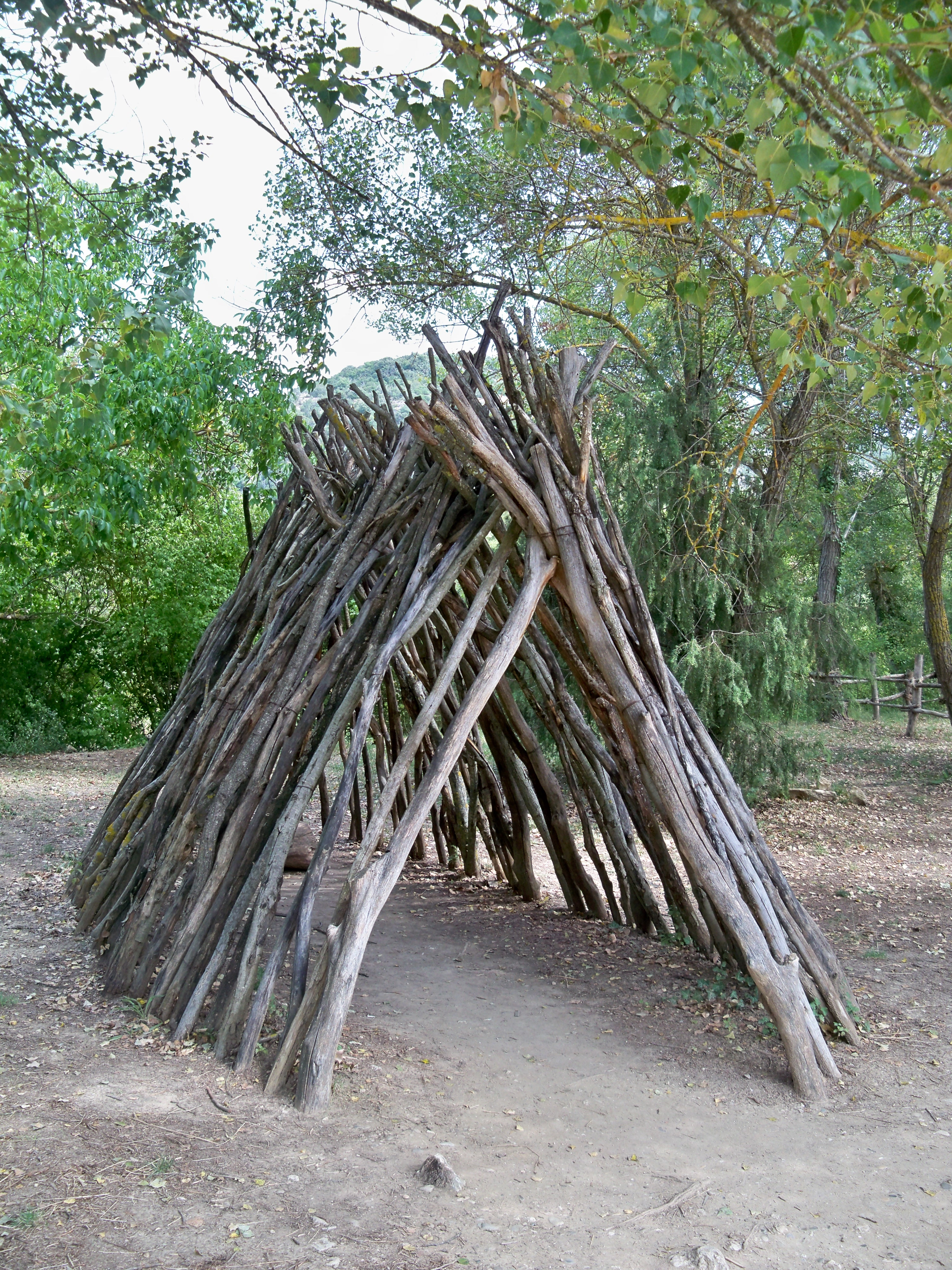 Reconstitution d'habitation à Quinson (04), France